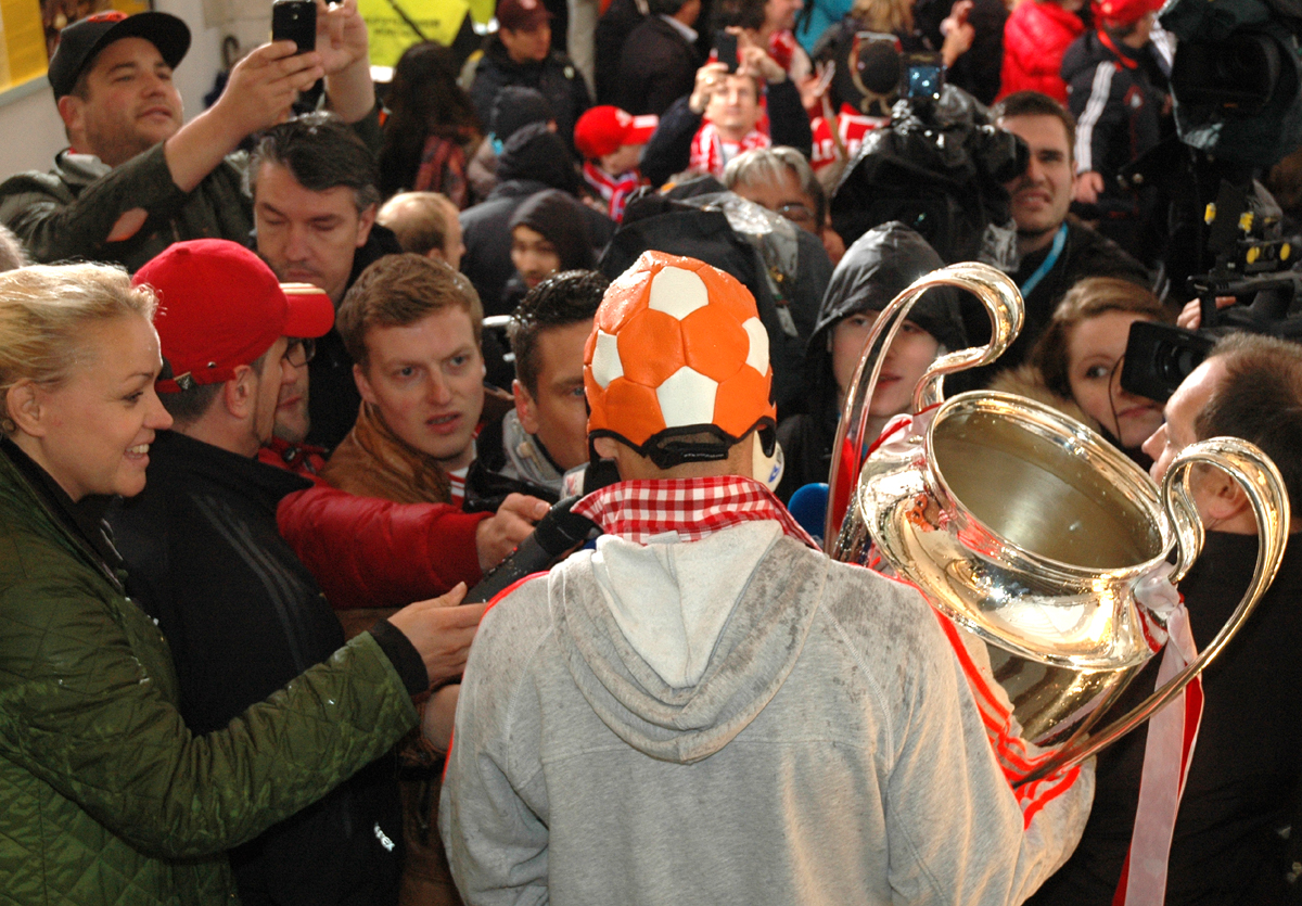 Arjen Robben mit dem Pokal im Rathaus in München